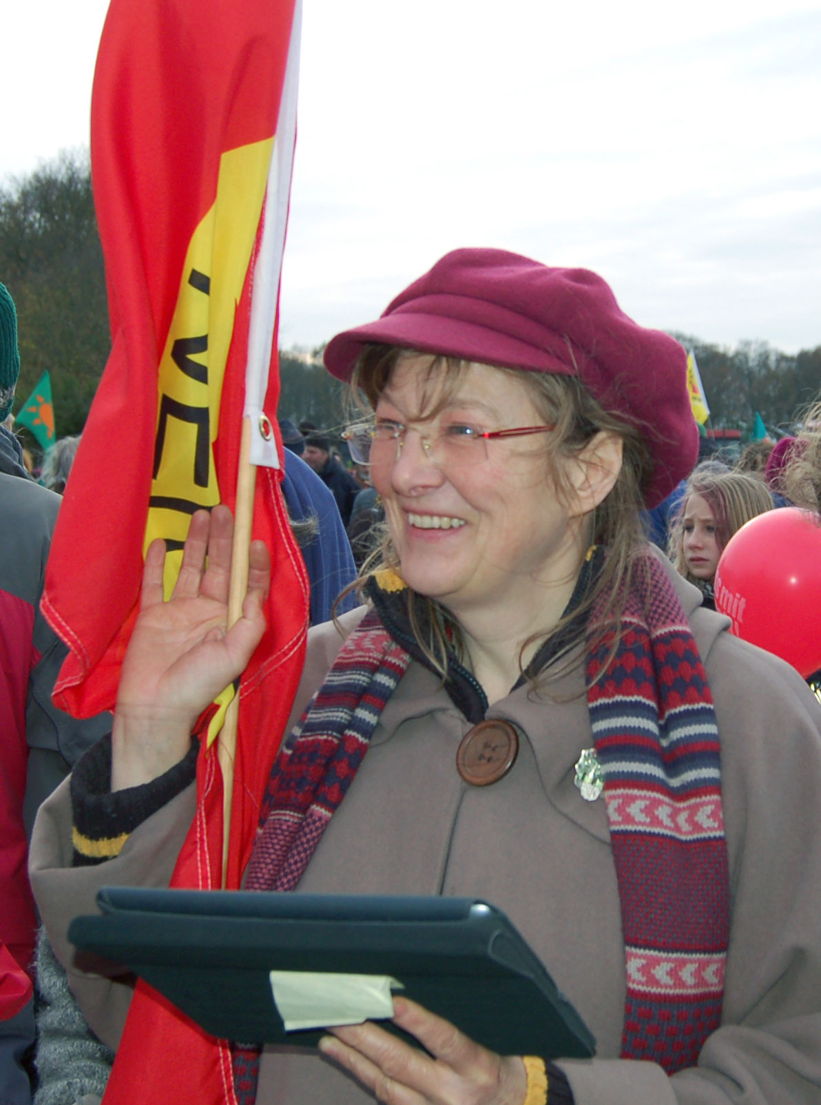 Johanna Voß liest Meldungen des Castor-Tickers vor. "Stopp Castor - Gorleben soll leben" - Demonstration am 26.11.11.